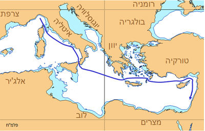 אוניית המעפילים פלמ'"ח - מסלול